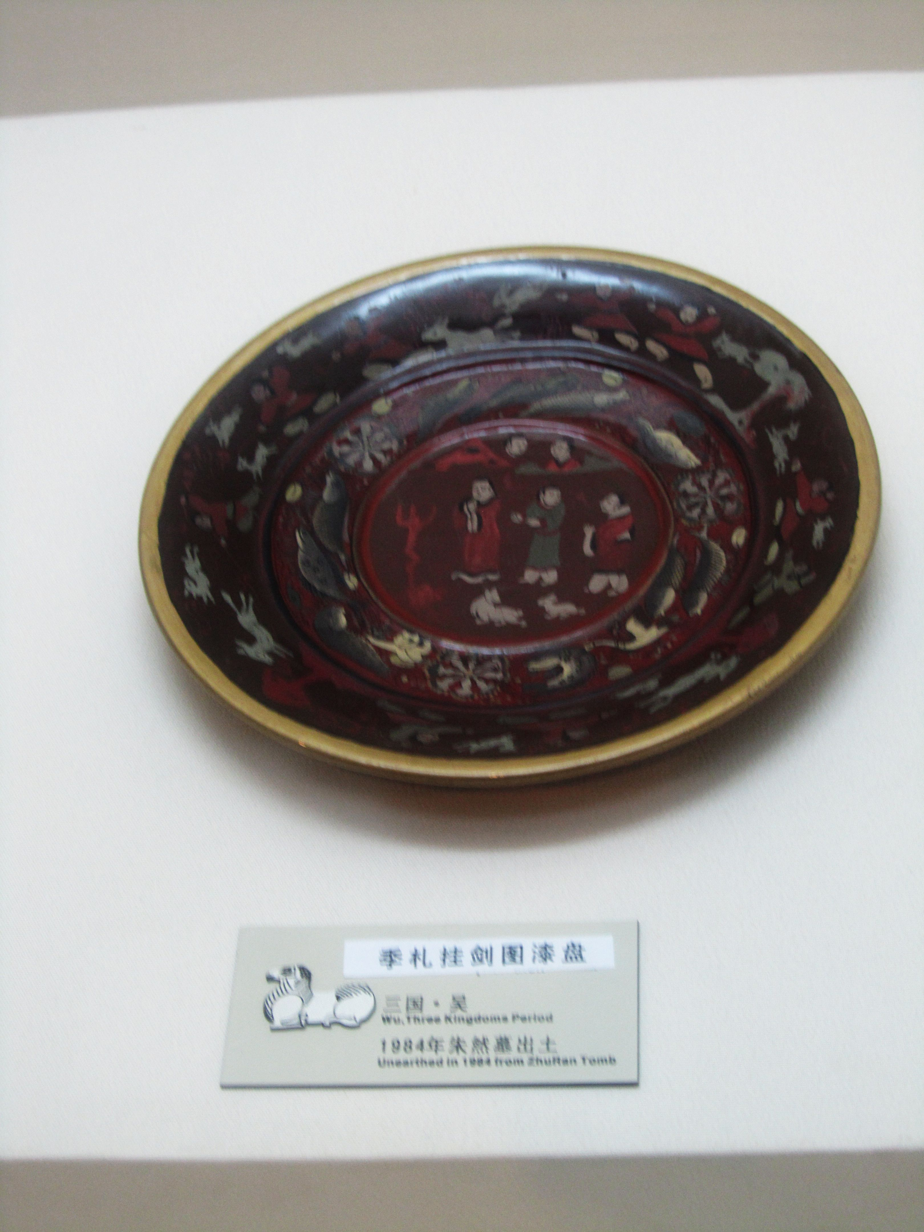 朱然家族墓地中出土的季札挂剑图漆盘。